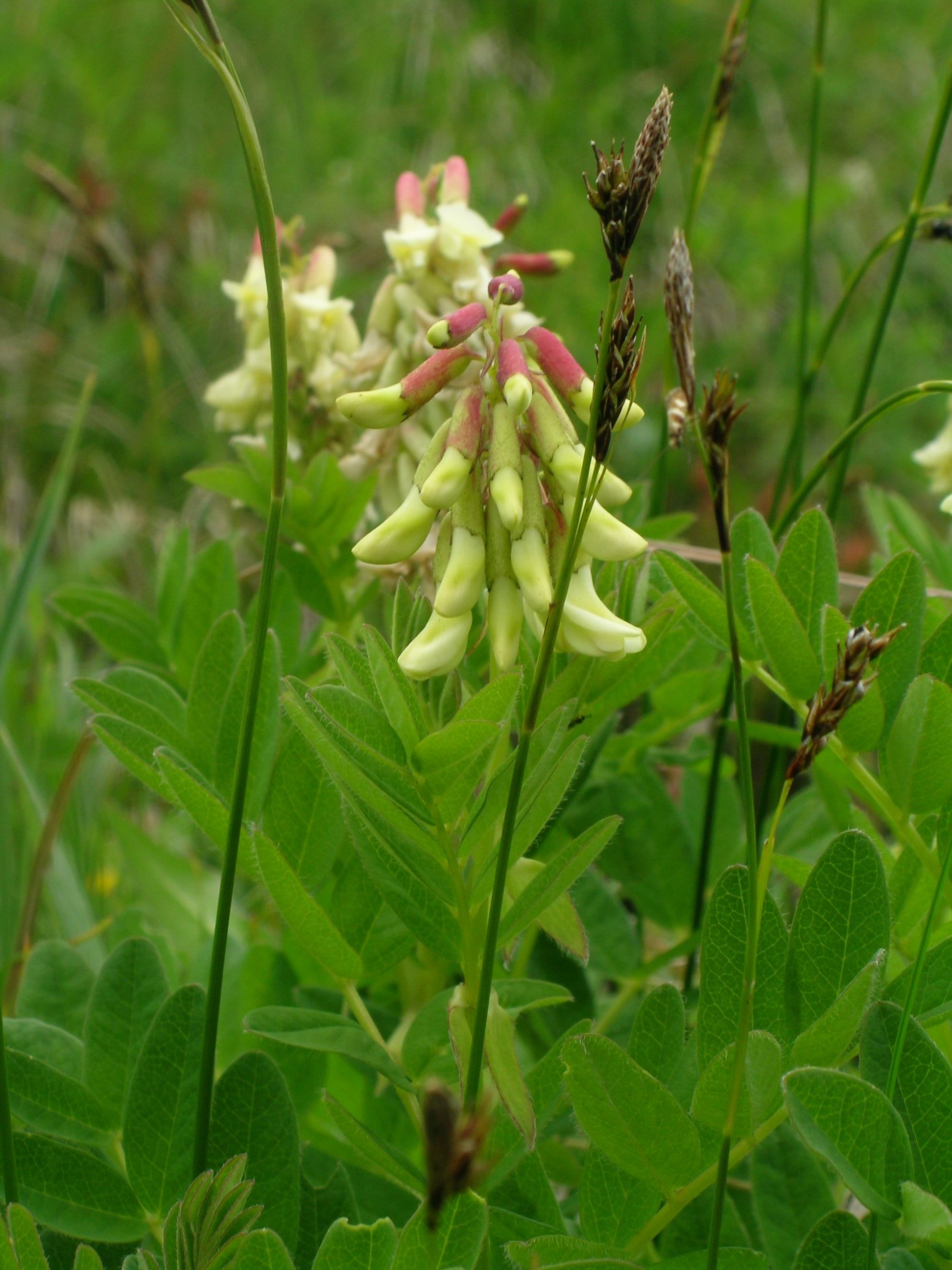 Astragalus frigidus, Schynige Platte, Kanton Bern, Schweiz